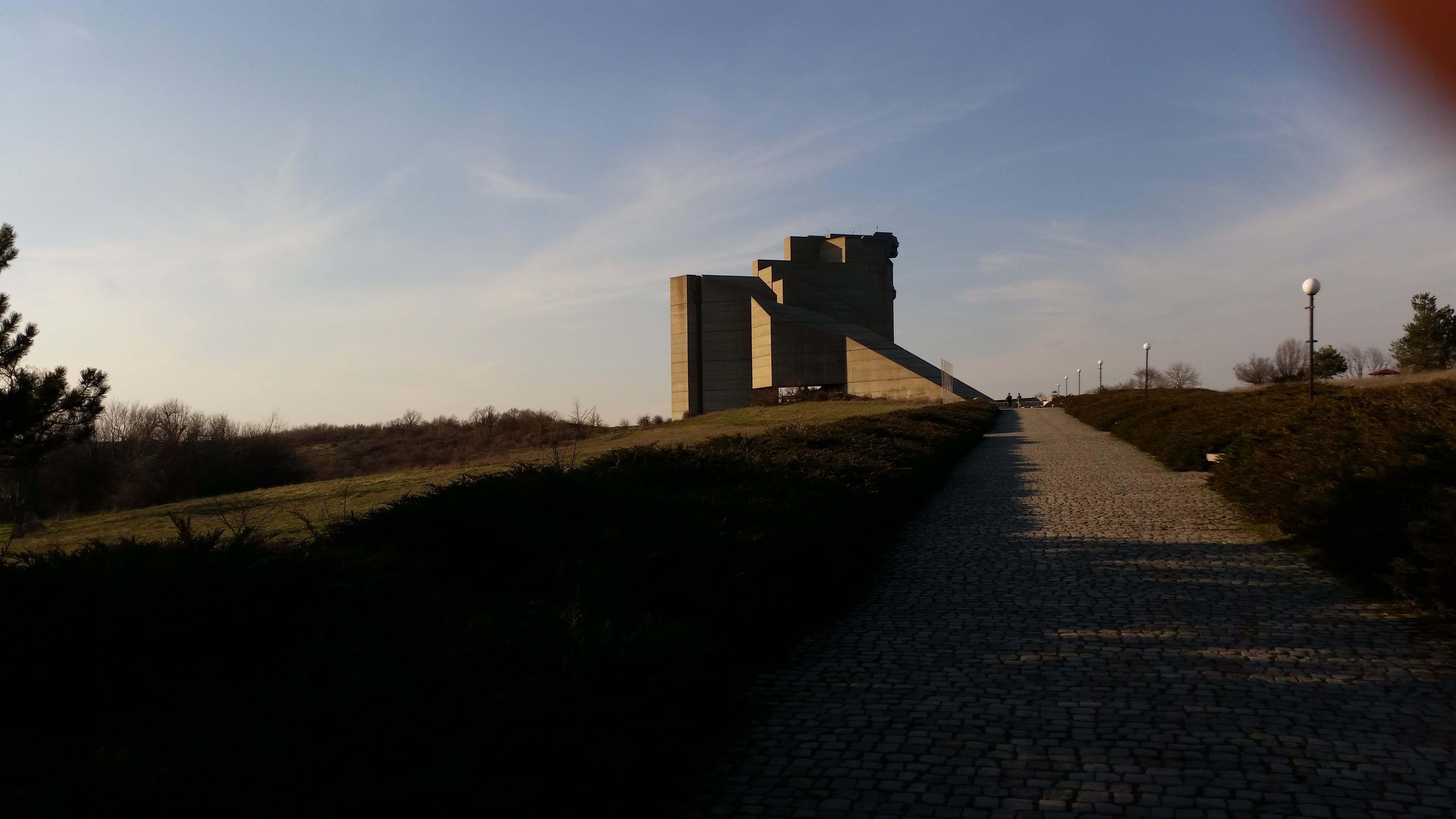 Situado en Shumen es un monumento construido en la era comunista.